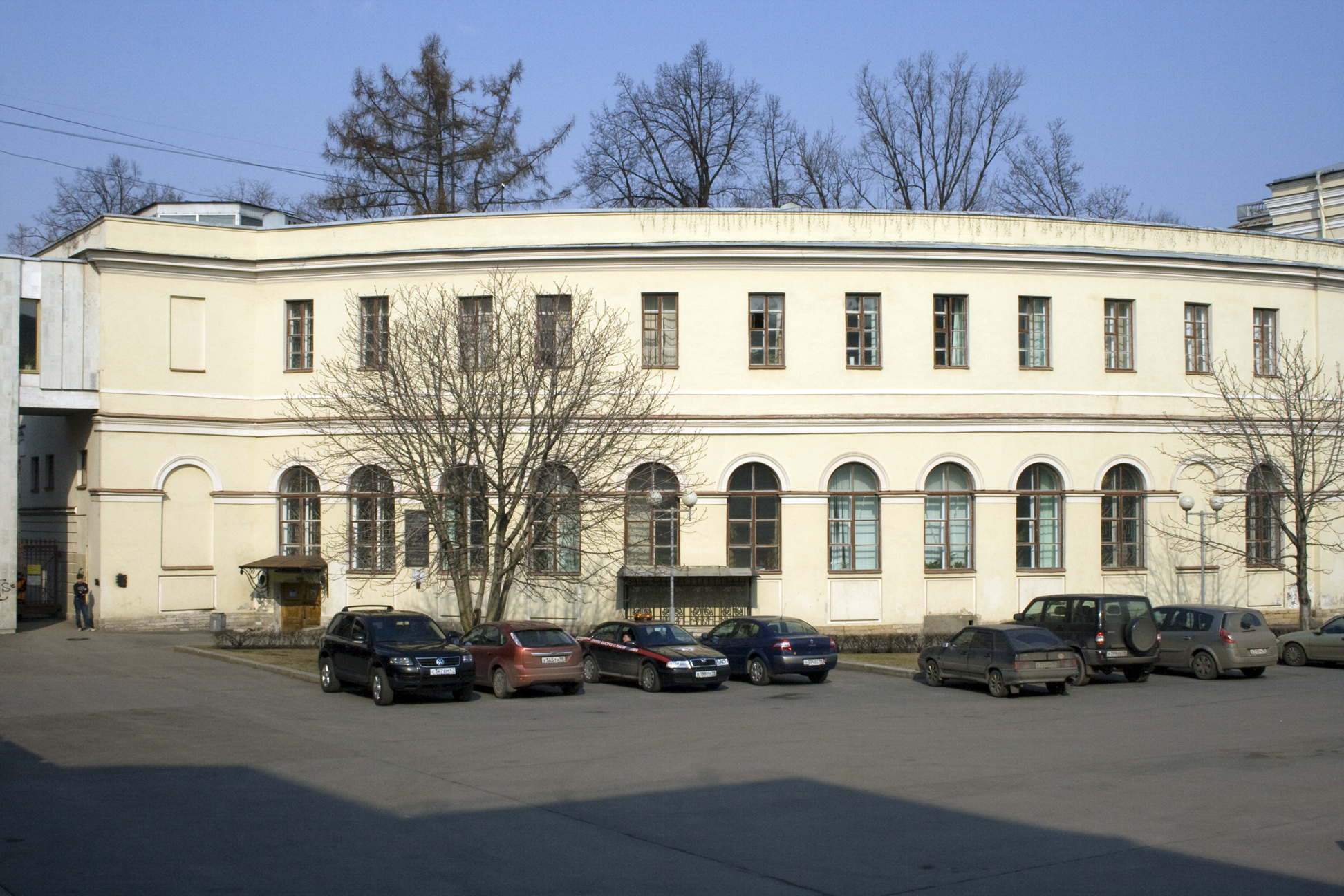 Сервизный Корпус Аничкова Дворца в Петербурге, в котором расположен Аничков лицей